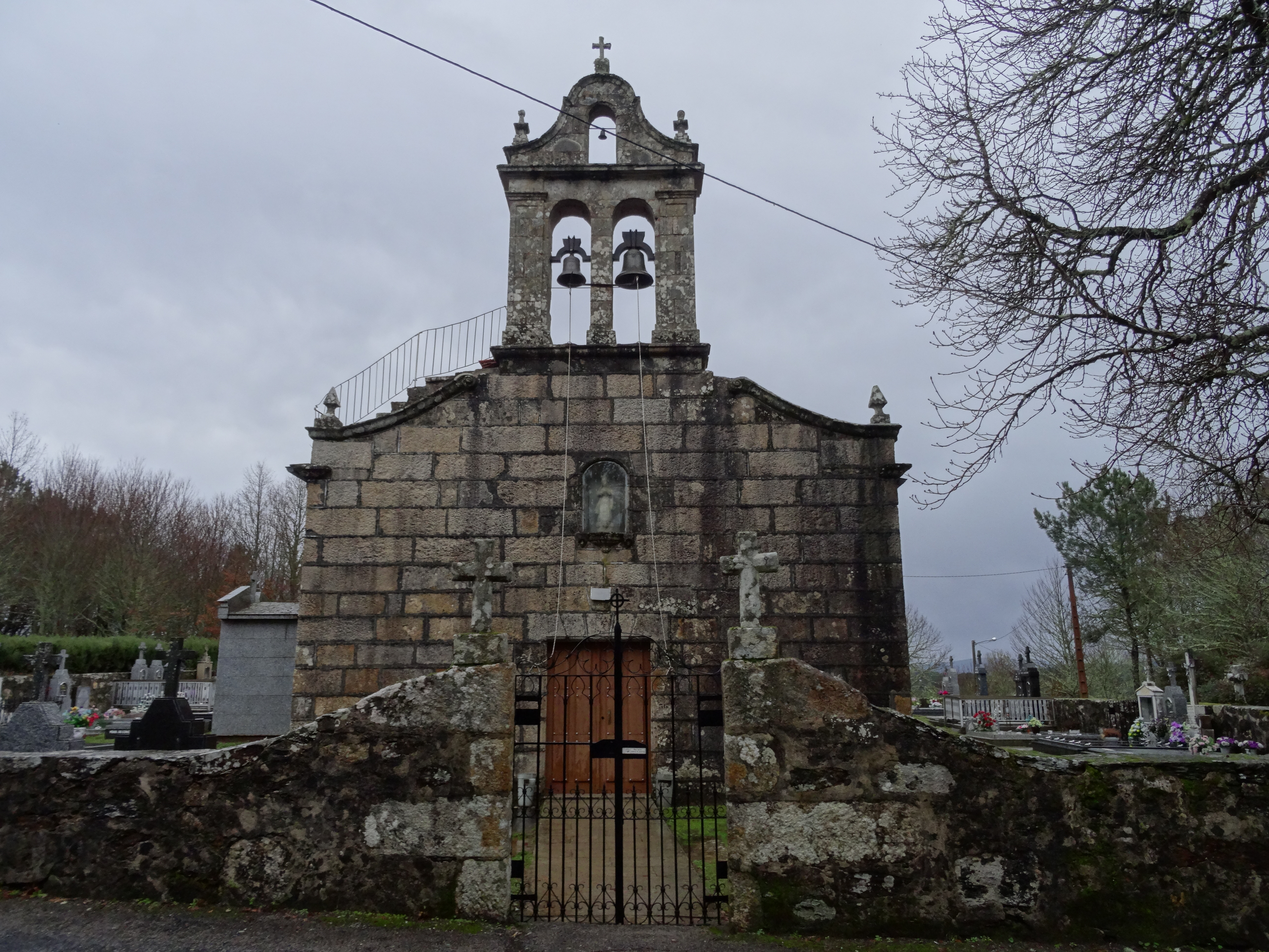 Ver título.